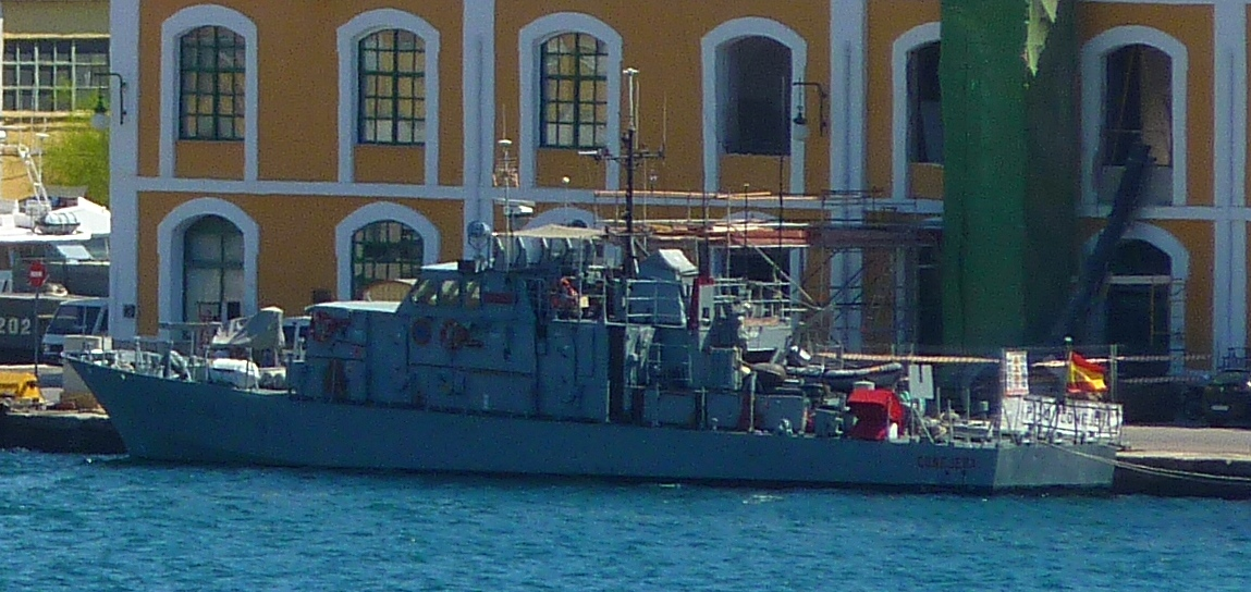 Patrullero Conejera de la Armada Española.